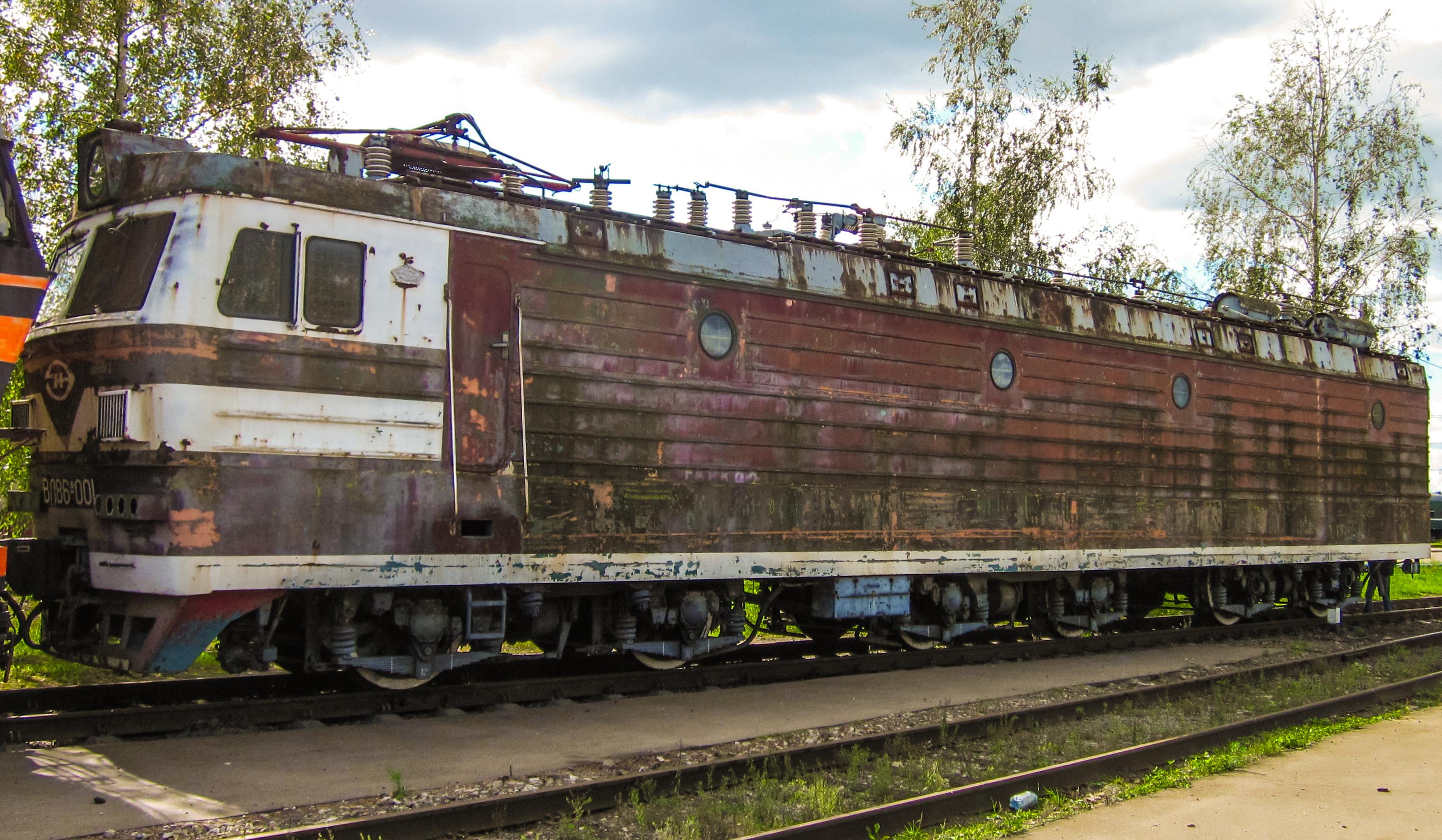 Секция Б электровоза ВЛ86ф-001 на территории депо экспериментального кольца в Щербинке